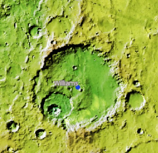 Cráter marciano Williams. (Imagen IAU/USGS/Goddard/A SU/USGS)